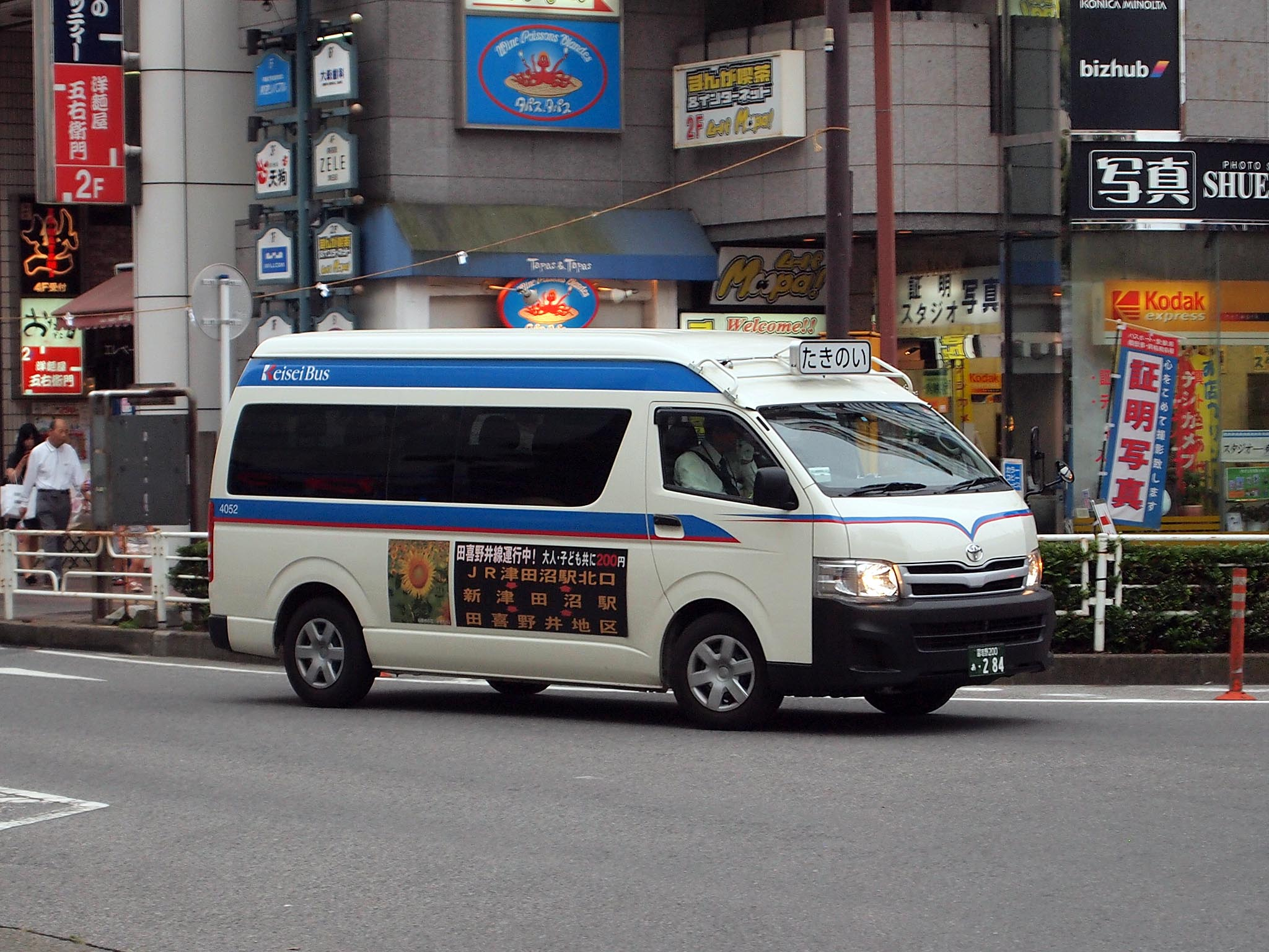 京成バスが運行する田喜野井線。船橋市から貸与されたハイエースが就役する。 登録番号：習志野200あ・284 社番：4052 撮影地：千葉県習志野市・JR津田沼駅